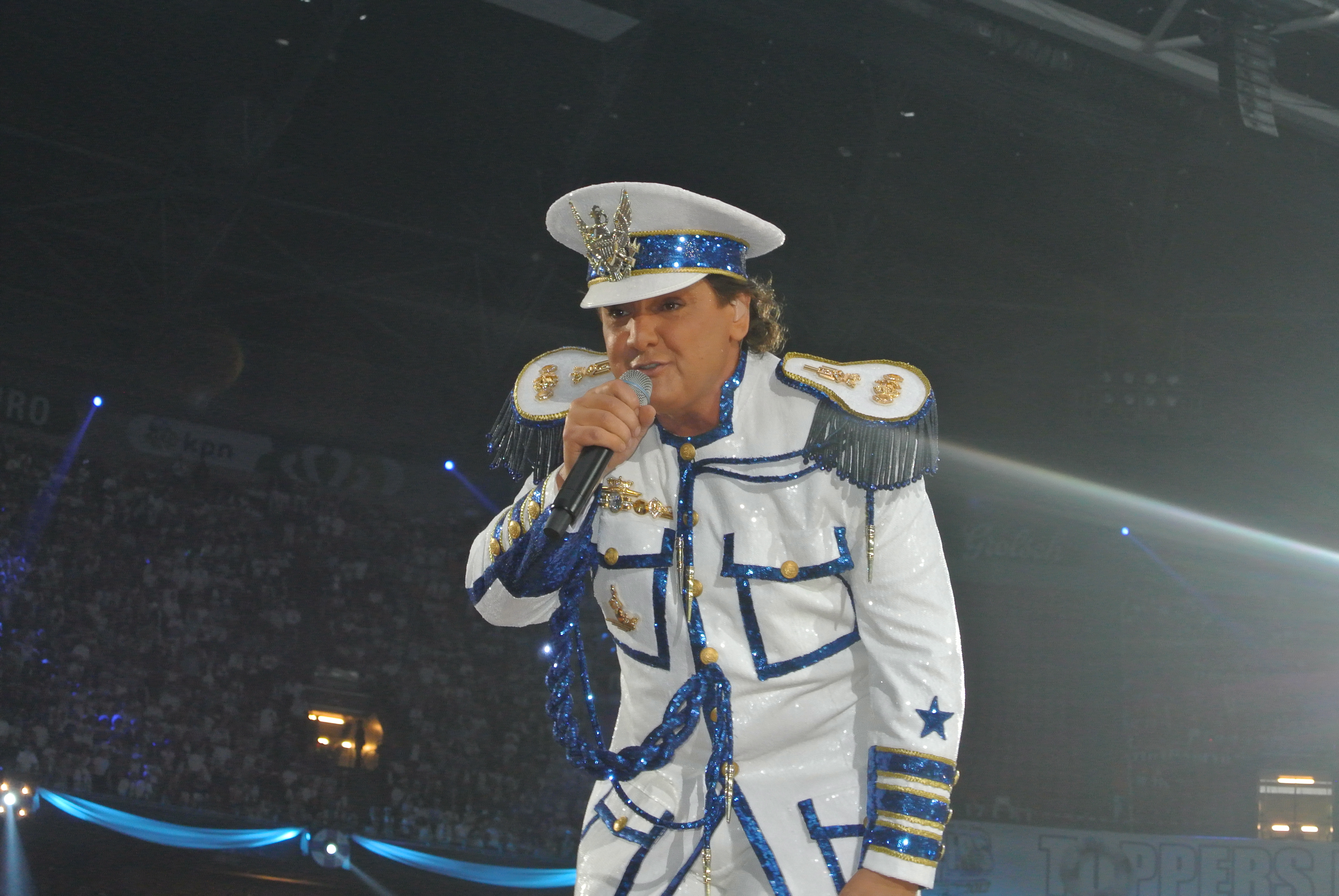 Topper René Froger